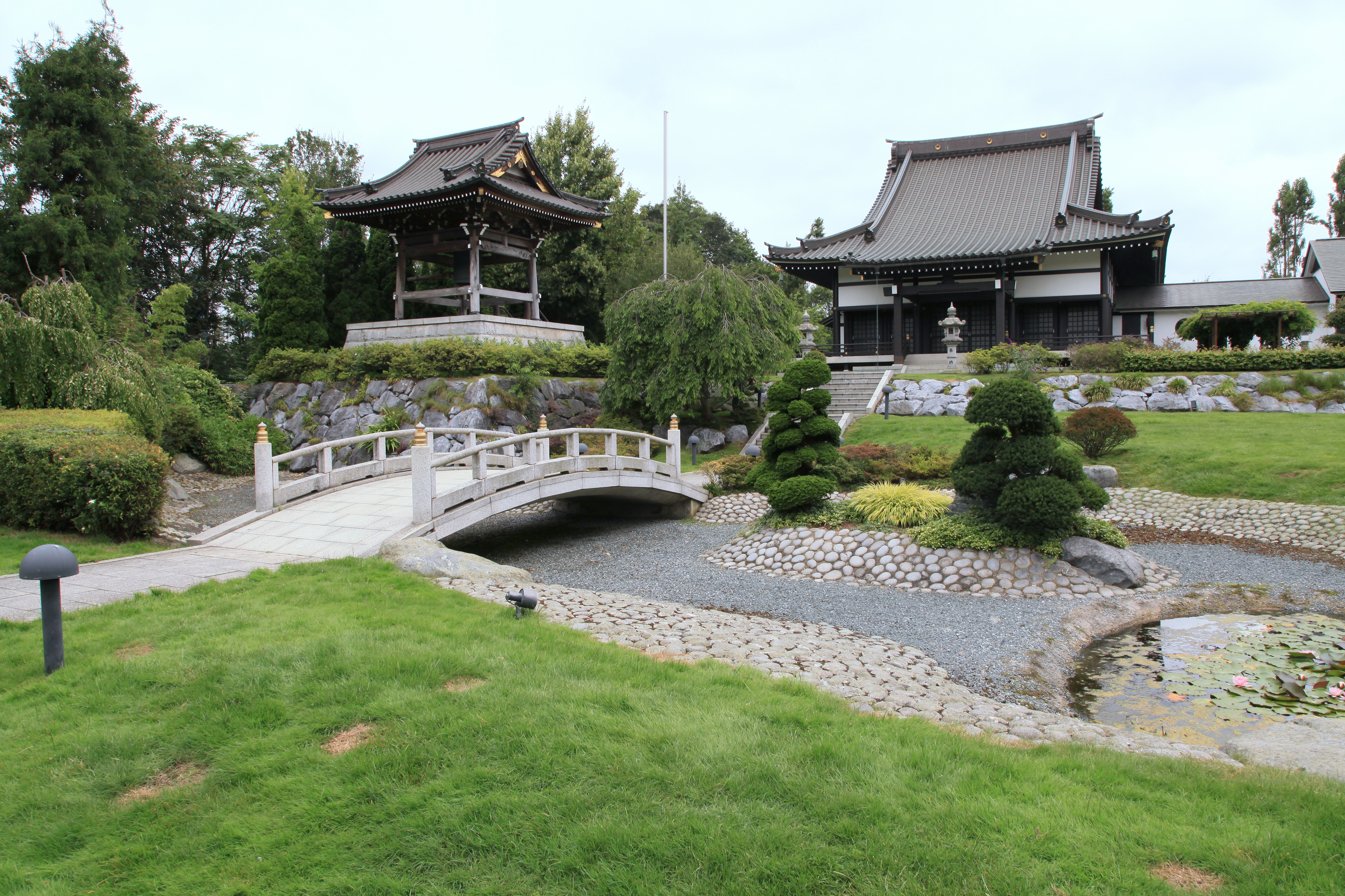 Japanischer Garten mit Glockenturm und Tempel, Eko-Haus, Brüggener Weg in Düsseldorf